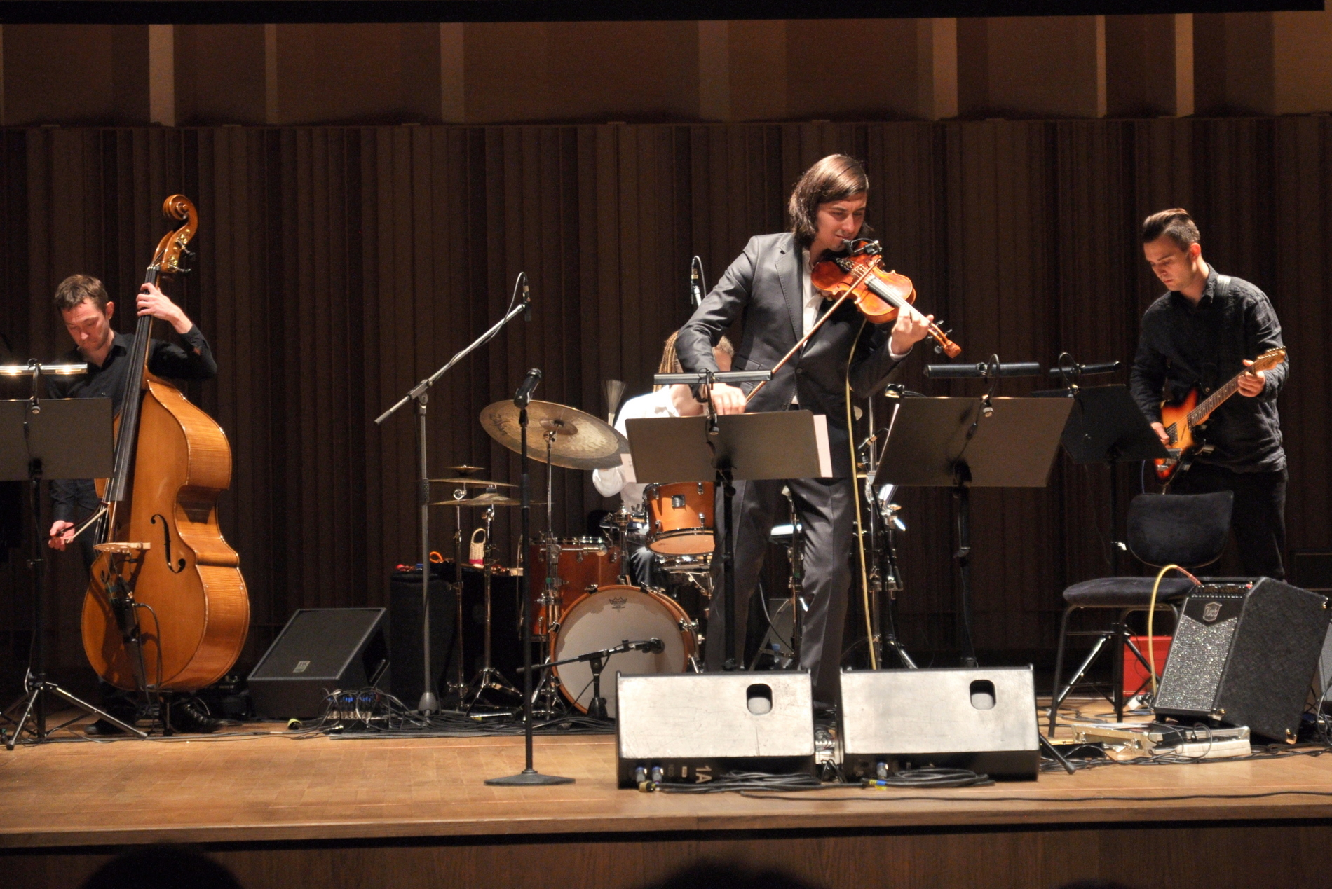 Koncert Adama Bałdycha w Filharmonii Gorzowskiej.